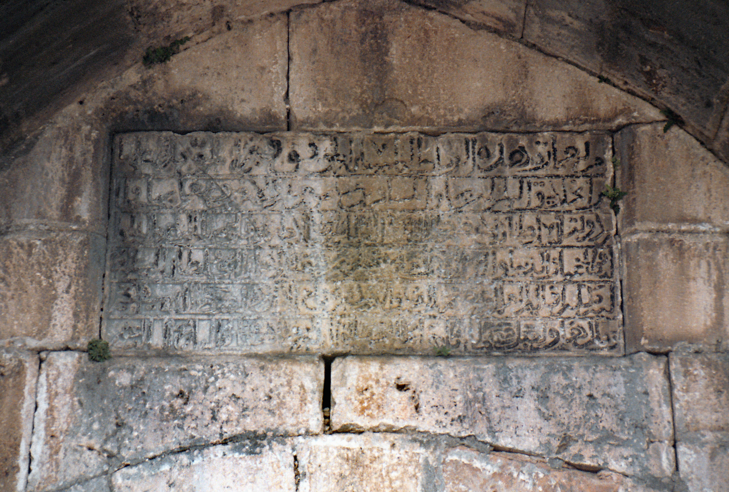 Kırkgöz Han, seldschukische Karawanserei bei Antalya in der Südtürkei, Bauinschrift